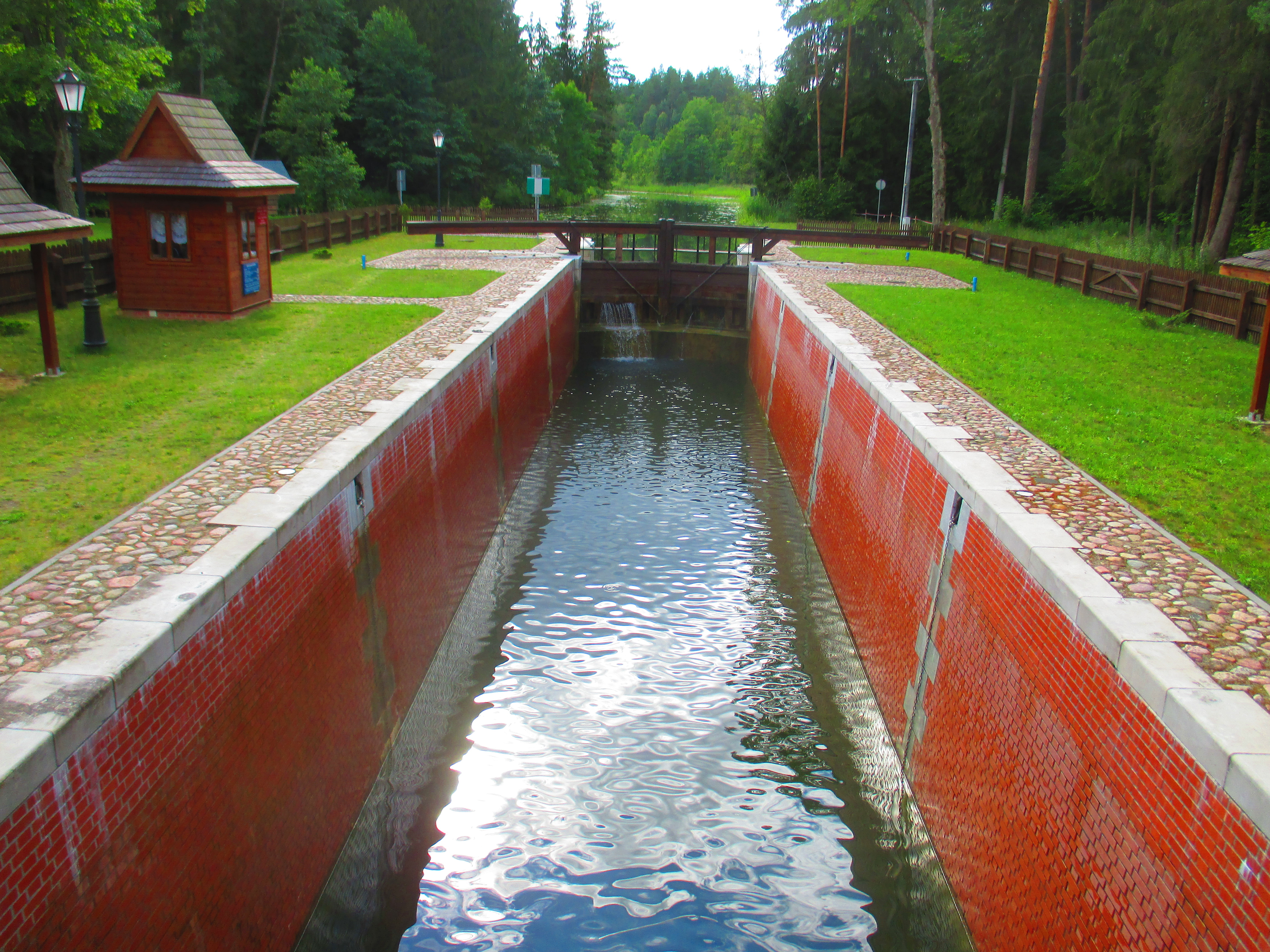 Widok na komorę i dolne wrota śluzy Perkuć